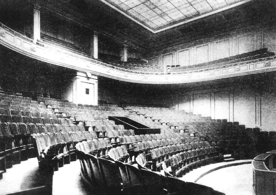 Langenbeck-Virchow-Haus in Berlin/Mitte, Auditorium